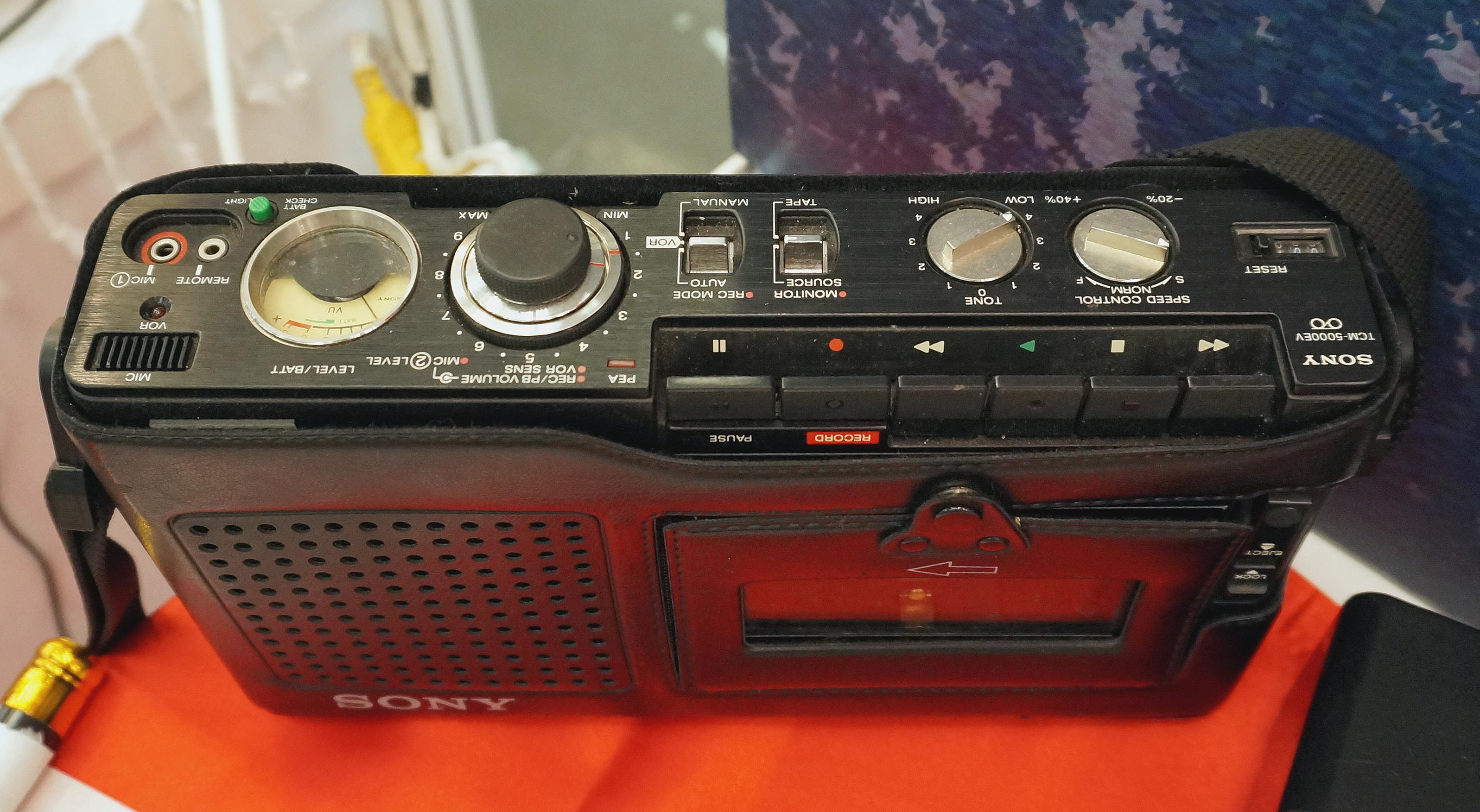 中文（台灣）: 索尼卡式錄放音機TCM-5000EV。